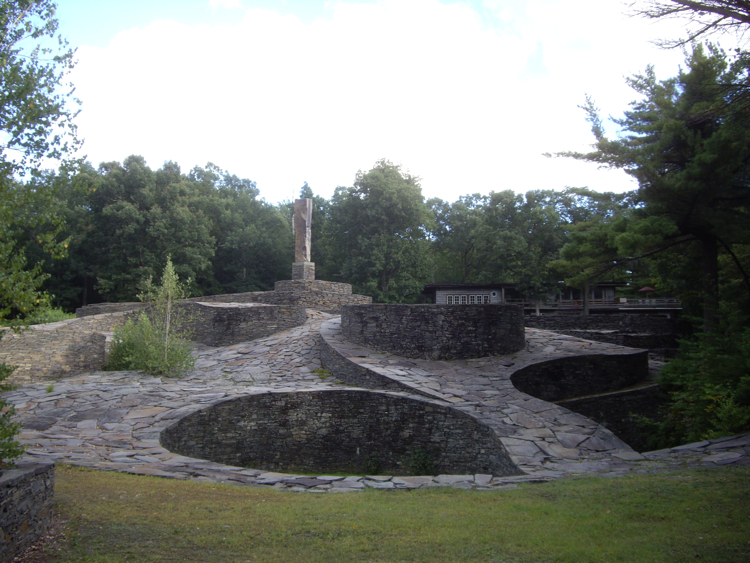 Opus 40